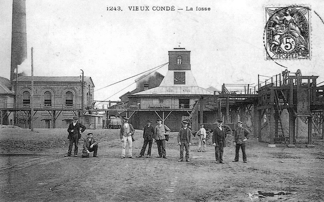 Fosse Vieux-Condé de la Compagnie des mines d'Anzin puis du Groupe de Valenciennes arrêtée depuis 1982.